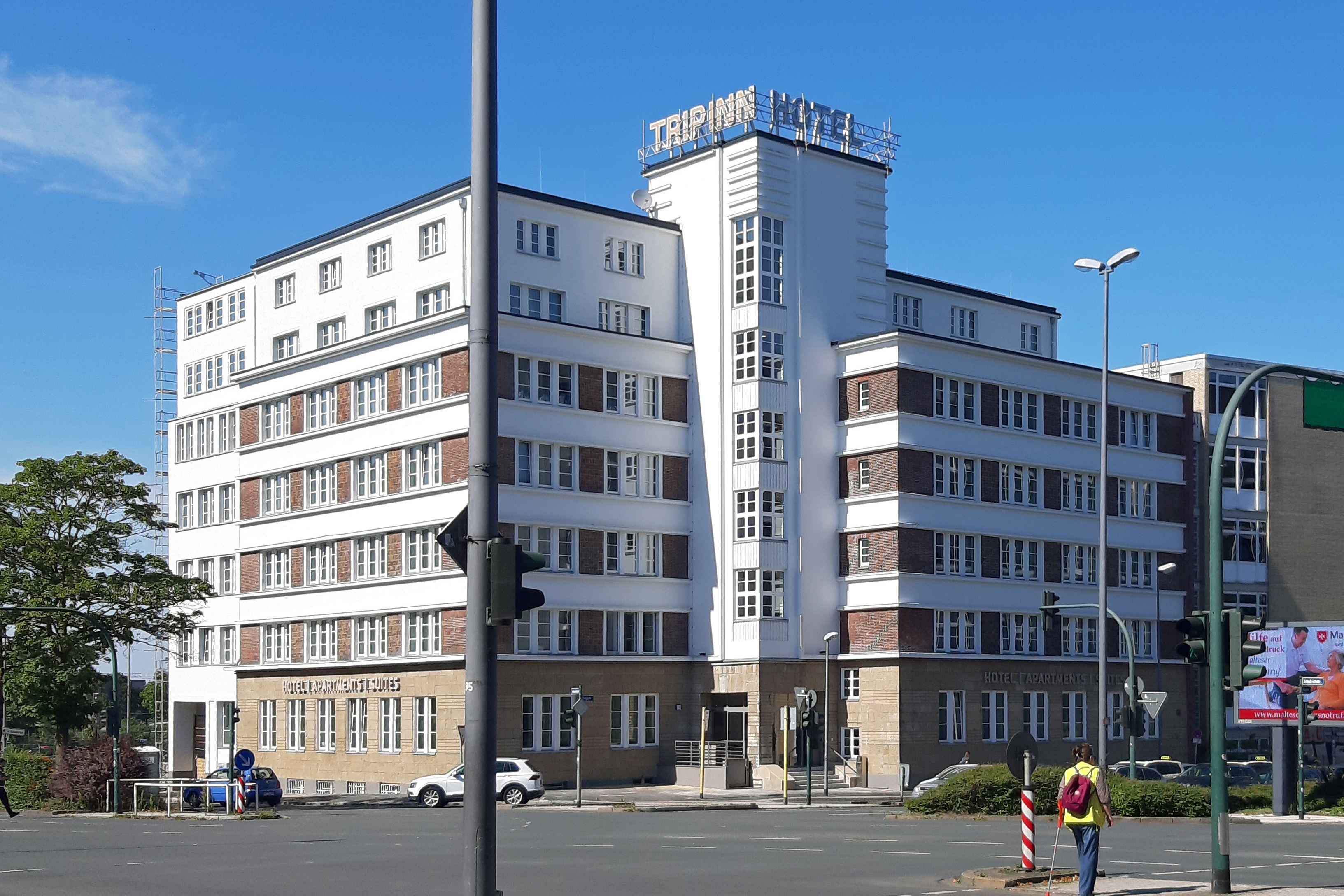 Trip Inn Hotel im Südviertel der Stadt Essen, vormals Osram-Haus, unter Denkmalschutz